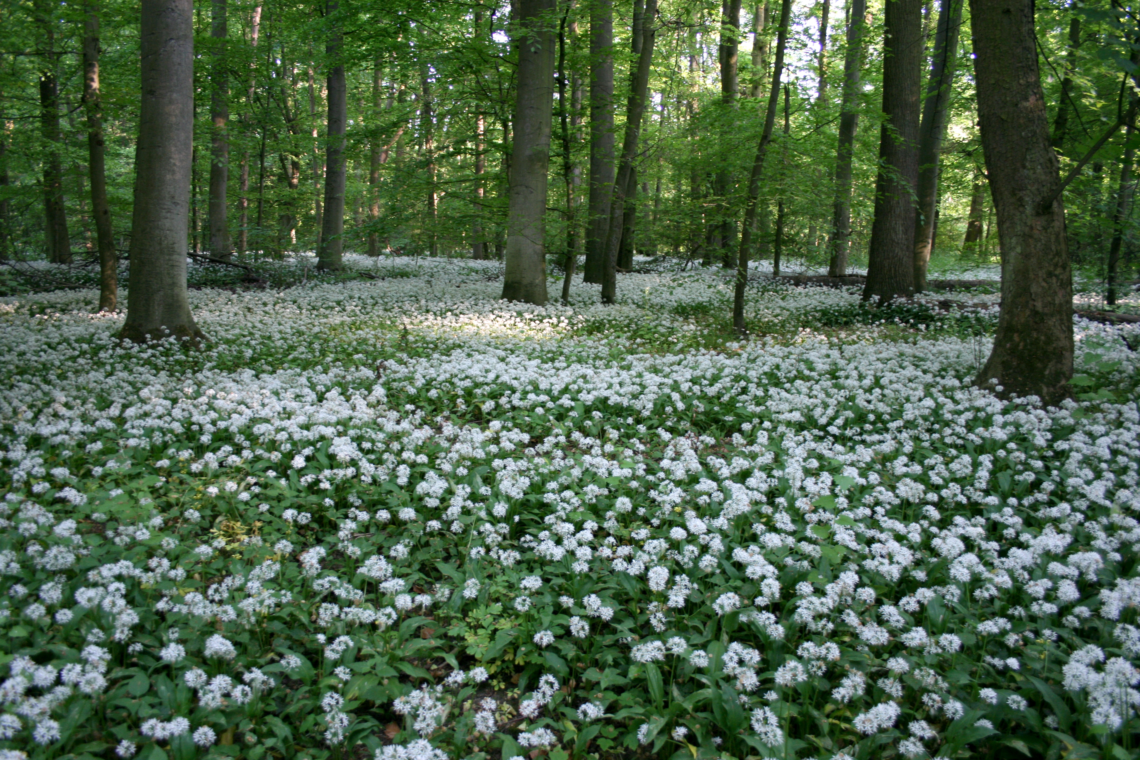 Blühender Bärlauch (Allium ursinum) in der Bulau zwischen Hanau und Erlensee; FFH-Gebiet „Erlensee bei Erlensee und Bulau bei Hanau“.